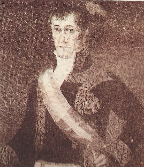 Retrato del Mariscal de Campo Juan Manuel de Cajigal y Martínez (1777-1823)